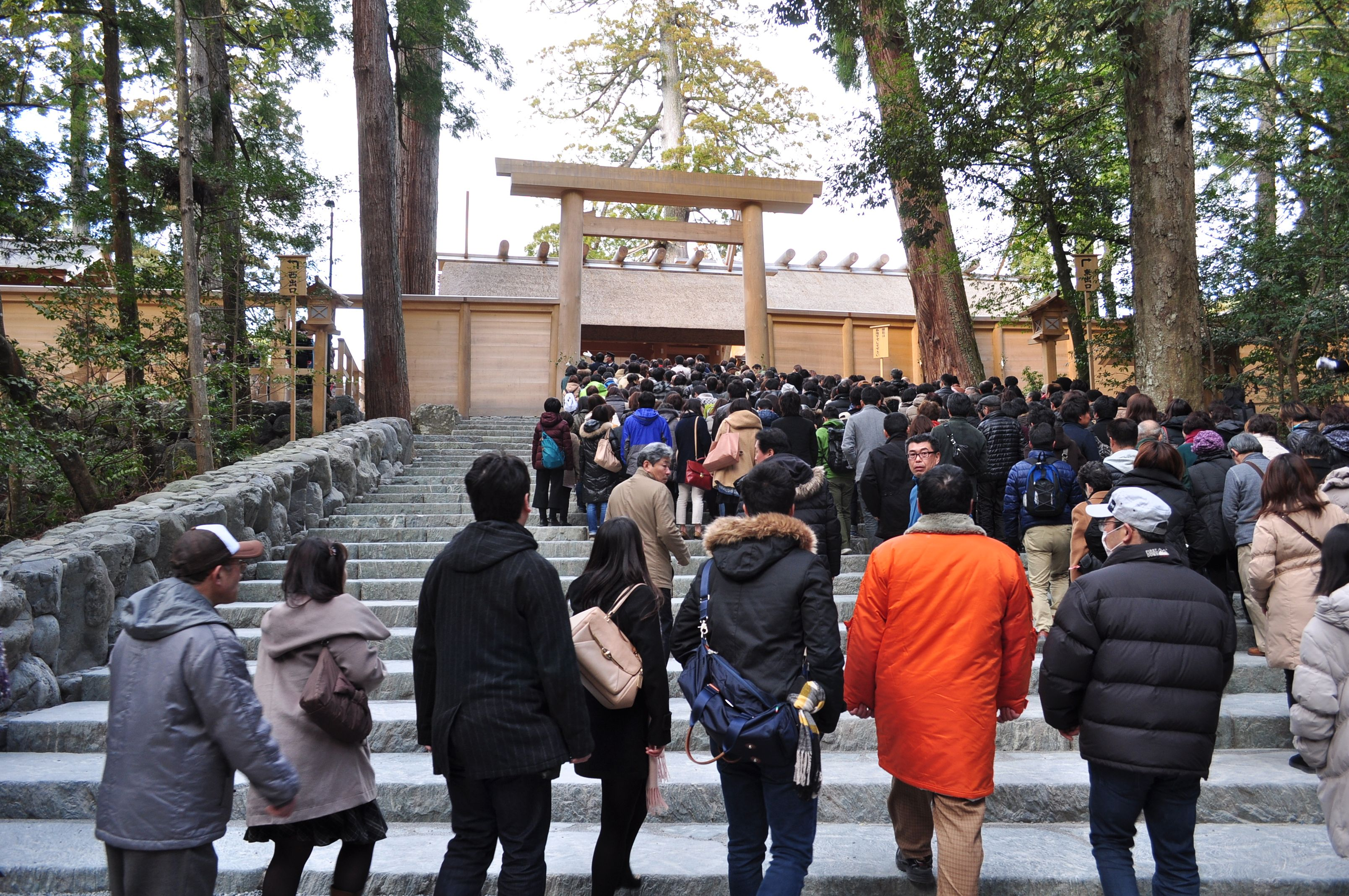 伊勢神宮 内宮 正宮 皇大神宮